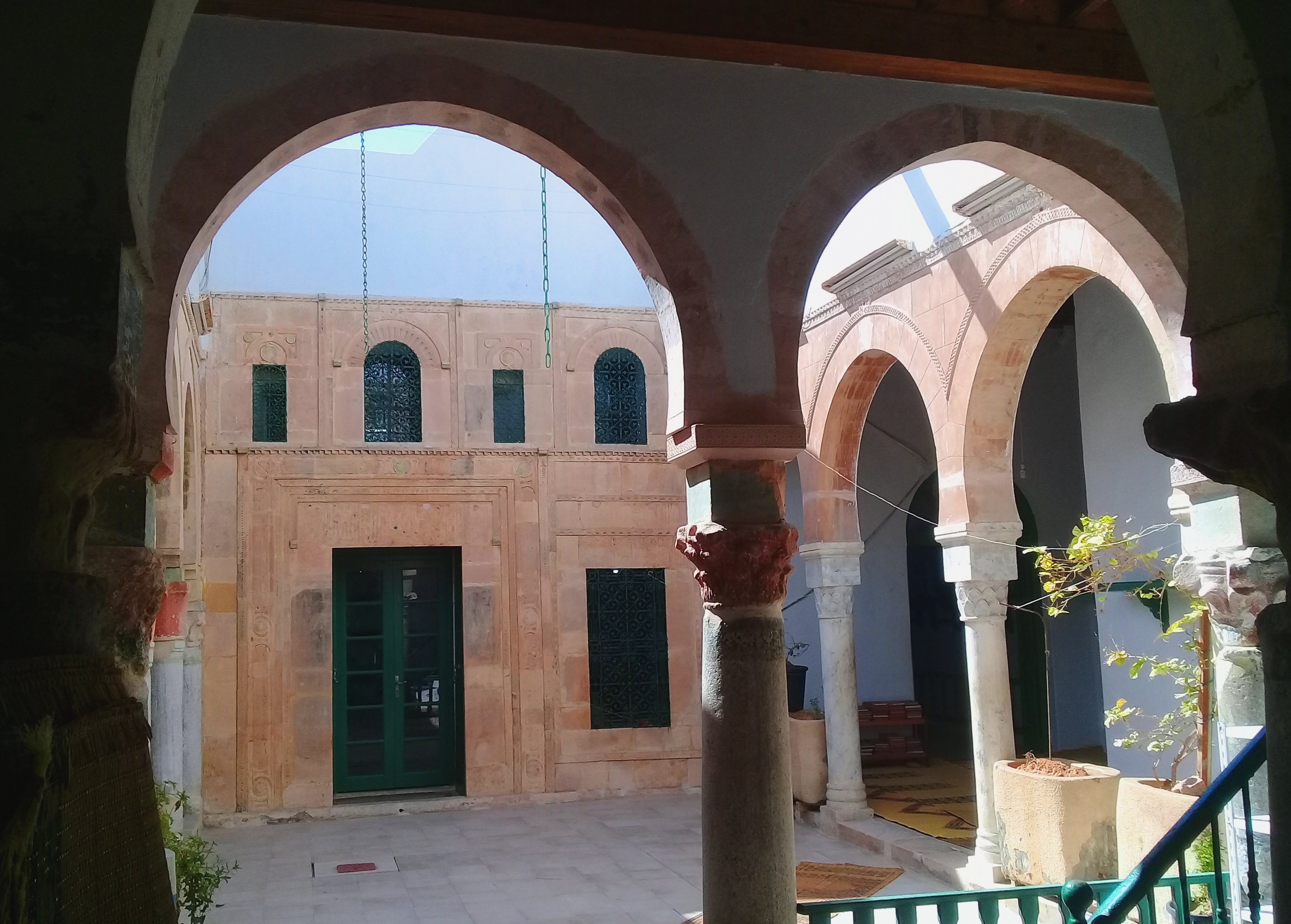 Vue sur patio